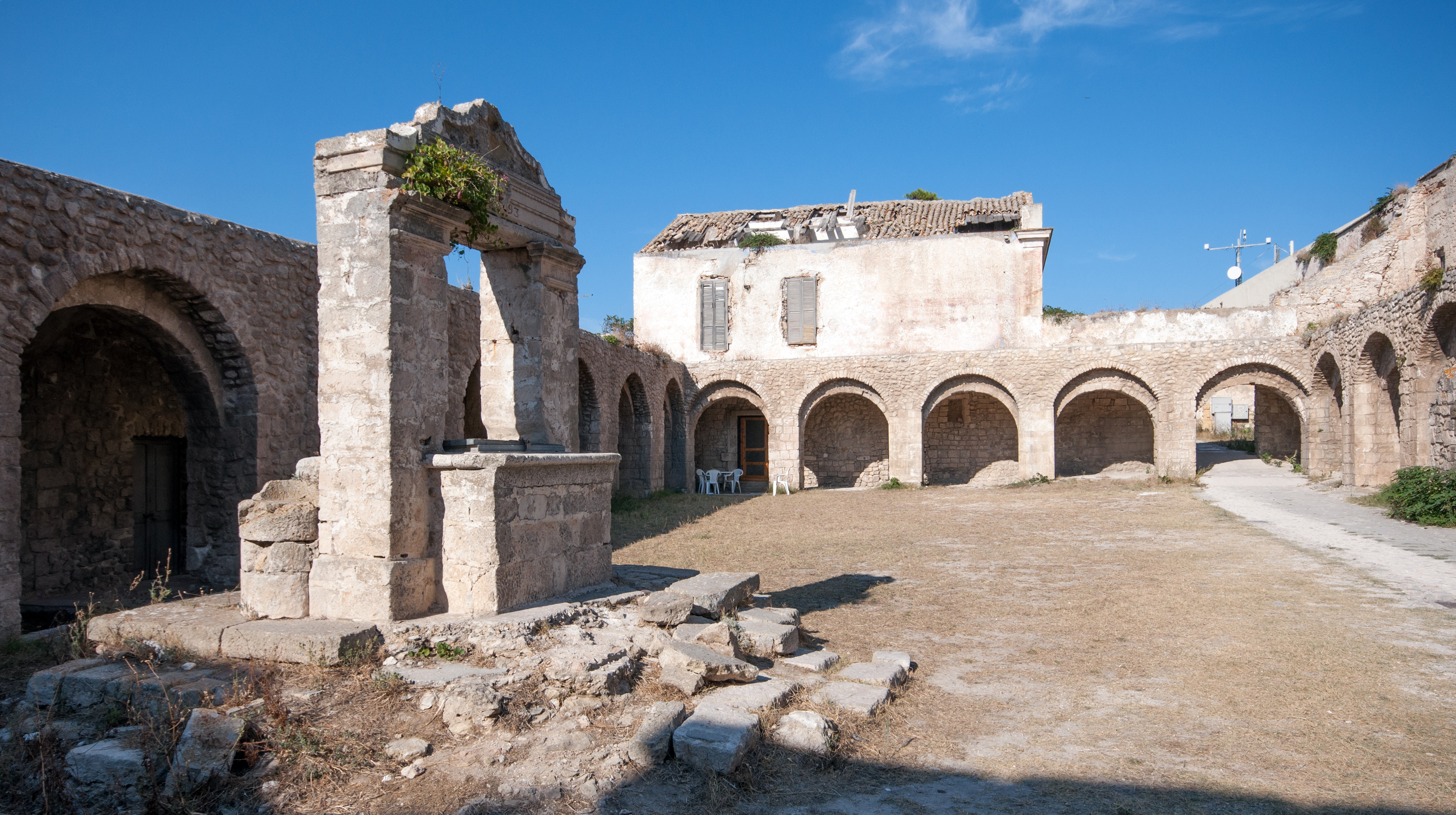 Santuario di Santa Maria a Mare - Isola di San Nicola, Isole Tremiti, Foggia, Italia